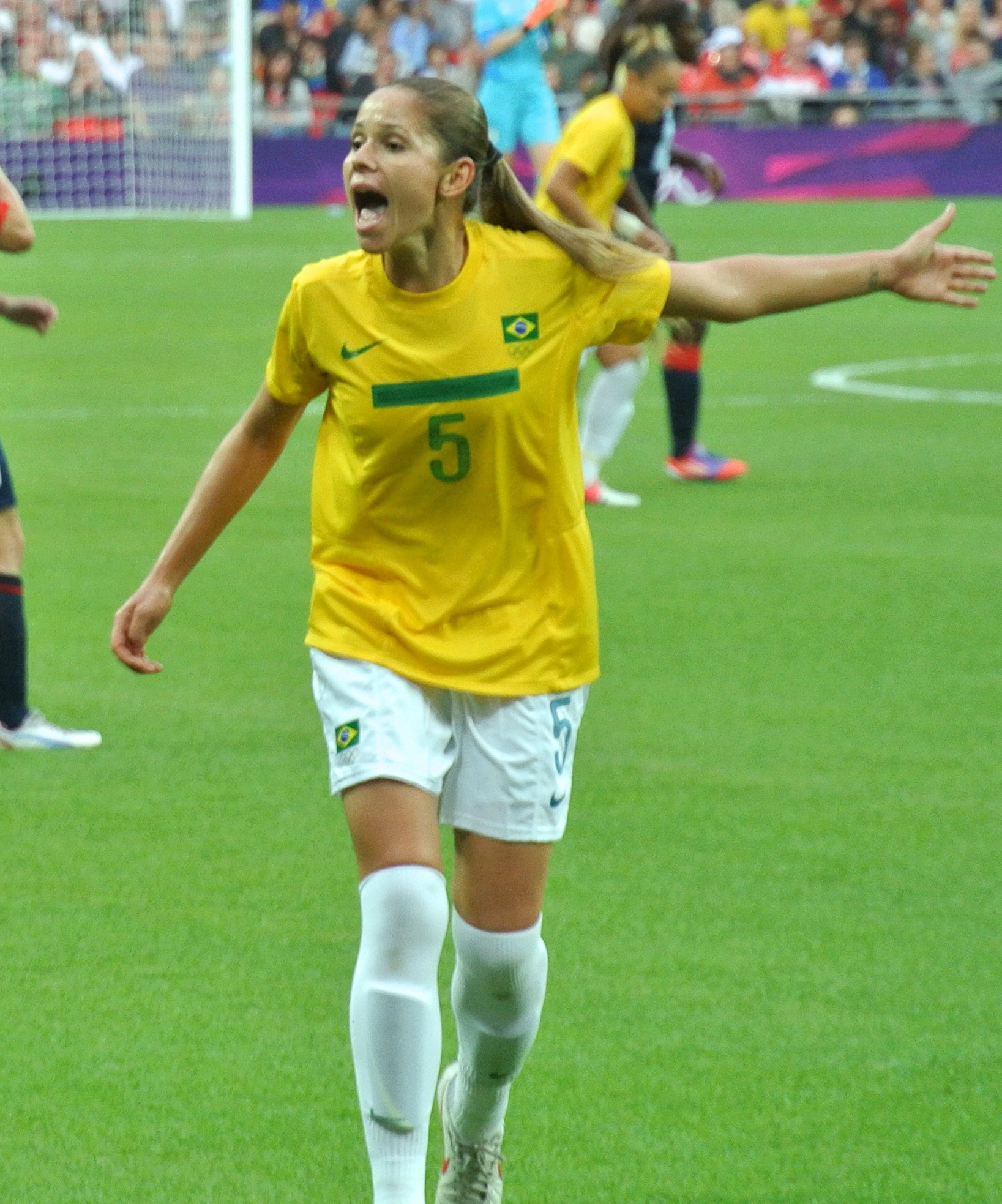 Érika Cristiano dos Santos gritando. Nikon 1 V1 + 1 Nikkor VR 30-110mm f/3.8-5.6